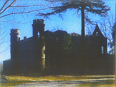 Los campos del Priorato tienen una historia de más de 1.000 años. Numerosas hachas y cerámicas atestiguan su pasado milenario